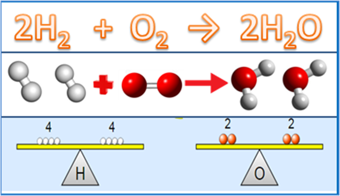 నీరు ఏర్పడుటకు తుల్య సమీకరణం